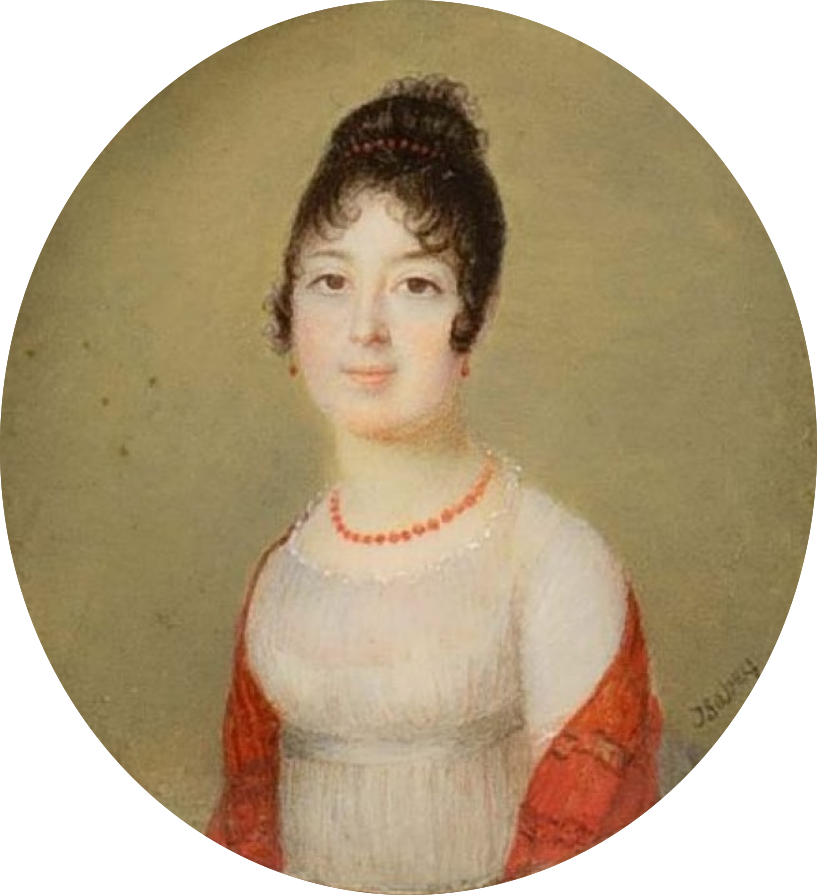 Portrait de Mlle Stéphanie de Tascher (1788-1832), duchesse d'Arenberg, puis marquise de Chaumont-Quitry